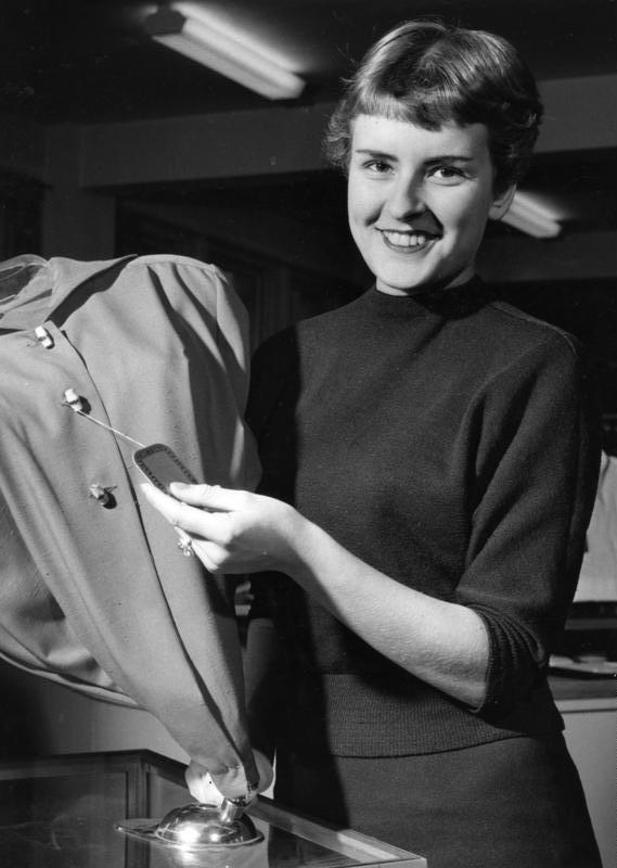 30.11.1953 Köln Textilfabrik Bierbaum-Proenen Das Etikett eines Markenartikels bezeugt die Garantie. Man kann ihn unbesehen kaufen.